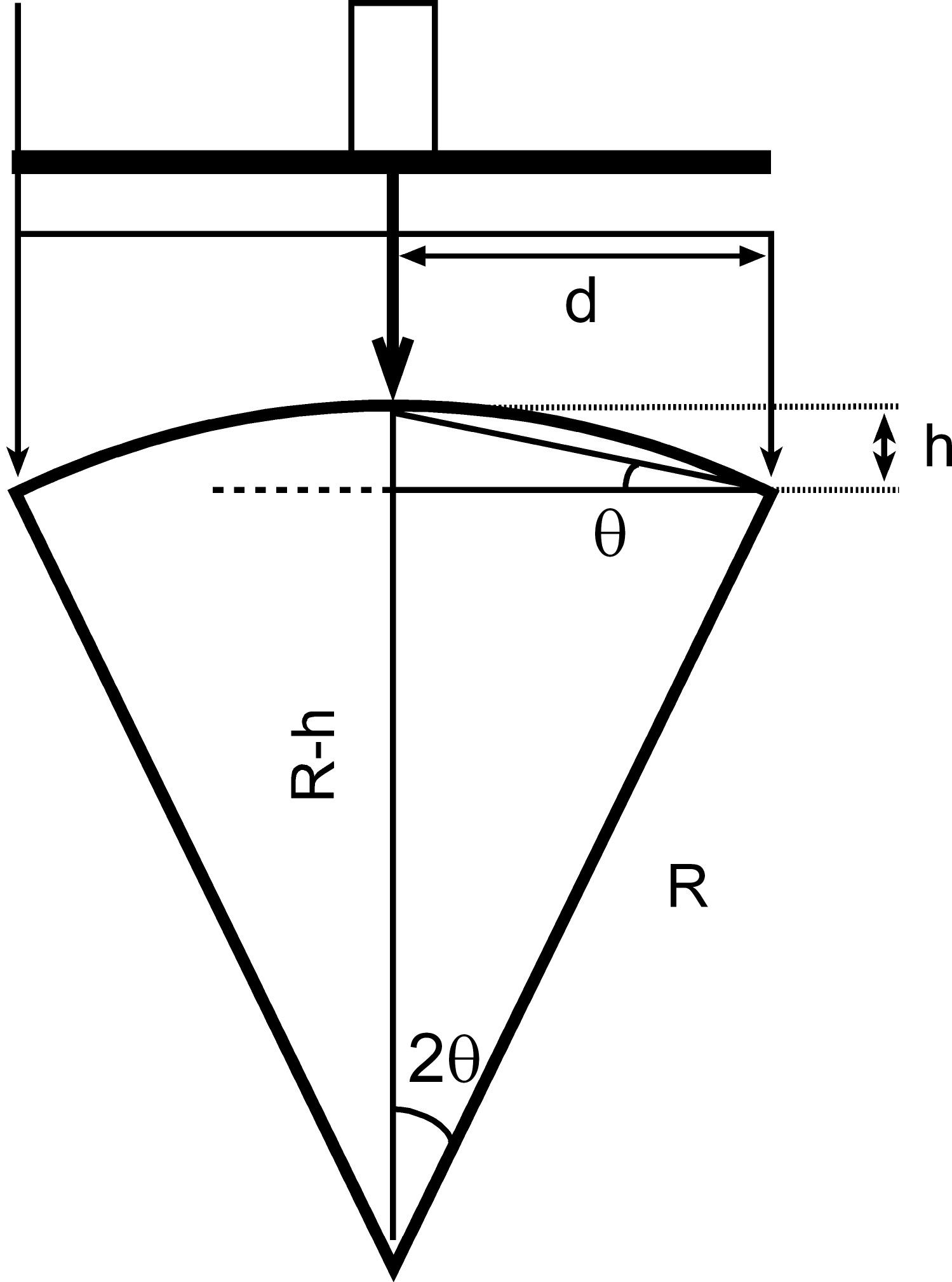 Diagrama que muestra cómo funciona el esferómetro al conlocarlo sobre una superficie esférica.